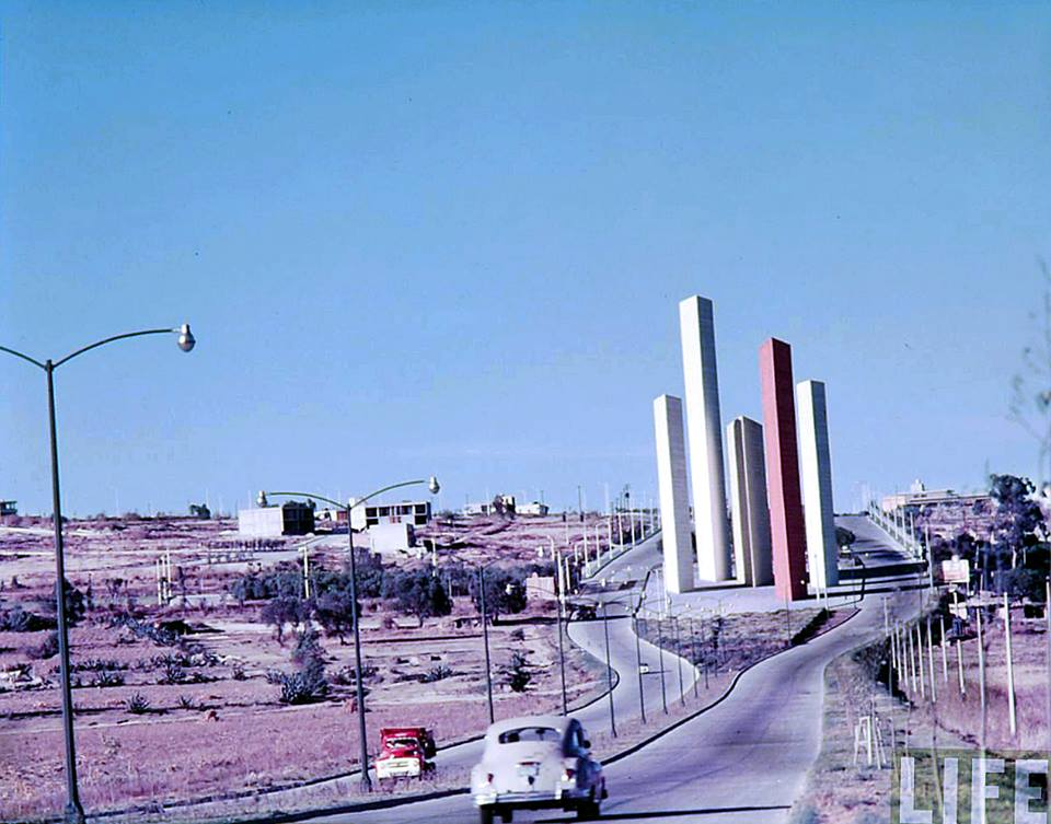 Torres de Satélite en la recién inaugurada Ciudad Satélite, 1957